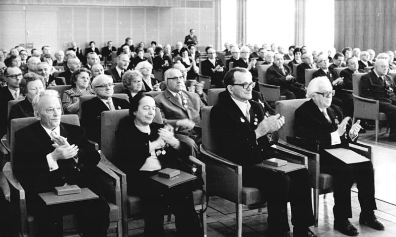 ADN-ZB Spremberg-11.3.76 Berlin: Auszeichnungen Im Amtssitz des Staatsrates der DDR wurde am Donnerstag, dem 11.3.76, an verdiente Bürger der DDR hohe staatliche Auszeichnungen verliehen. Sie wurden von Gerald Götting, Stellvertreter des Vorsitzenden des Staatsrates, überreicht. In Anerkennung überragender Verdienste in der Arbeiterbewegung, bei der schöpferischen Anwendung des Marxismus-Leninismus und im Kampf für Frieden und Völkerfreundschaft wurden mit dem Karl-Marx-Orden geehrt: Karl Raab, Abteilungsleiter des ZK der SED, Prof. Hermann Grosse, wissenschaftlicher Mitarbeiter im Zentralinstitut für sozialistische Wirtschaftsführung beim ZK der SED, Prof. Dr. Lea Grundig, Mitglied des ZK der SED, freischaffende Malerin und Grafikerin, sowie Alwin Günther, Arbeiterveteran aus Suhl (1. Reihe v.r.n.l.).